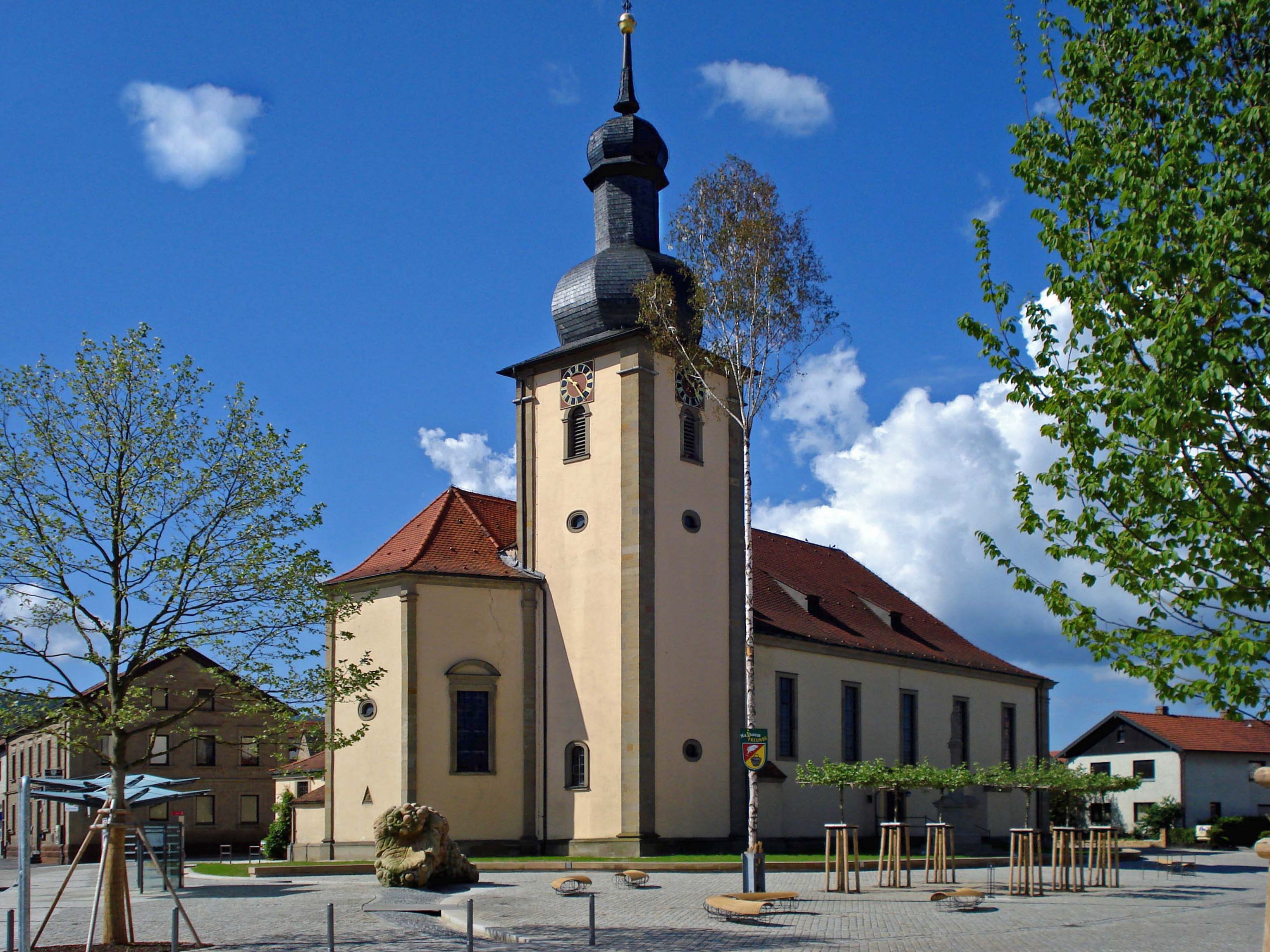 Kirchplatz in Sand am Main (Unterfranken)